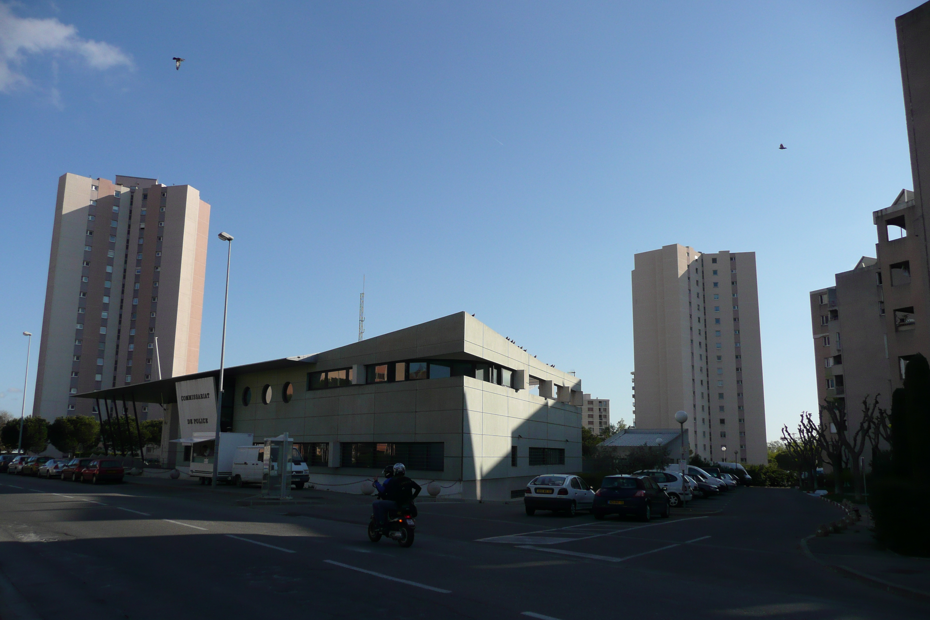 Comissariat de police et les plus haute tour de la ville (18 niveaux) à Salon-de-Provence.